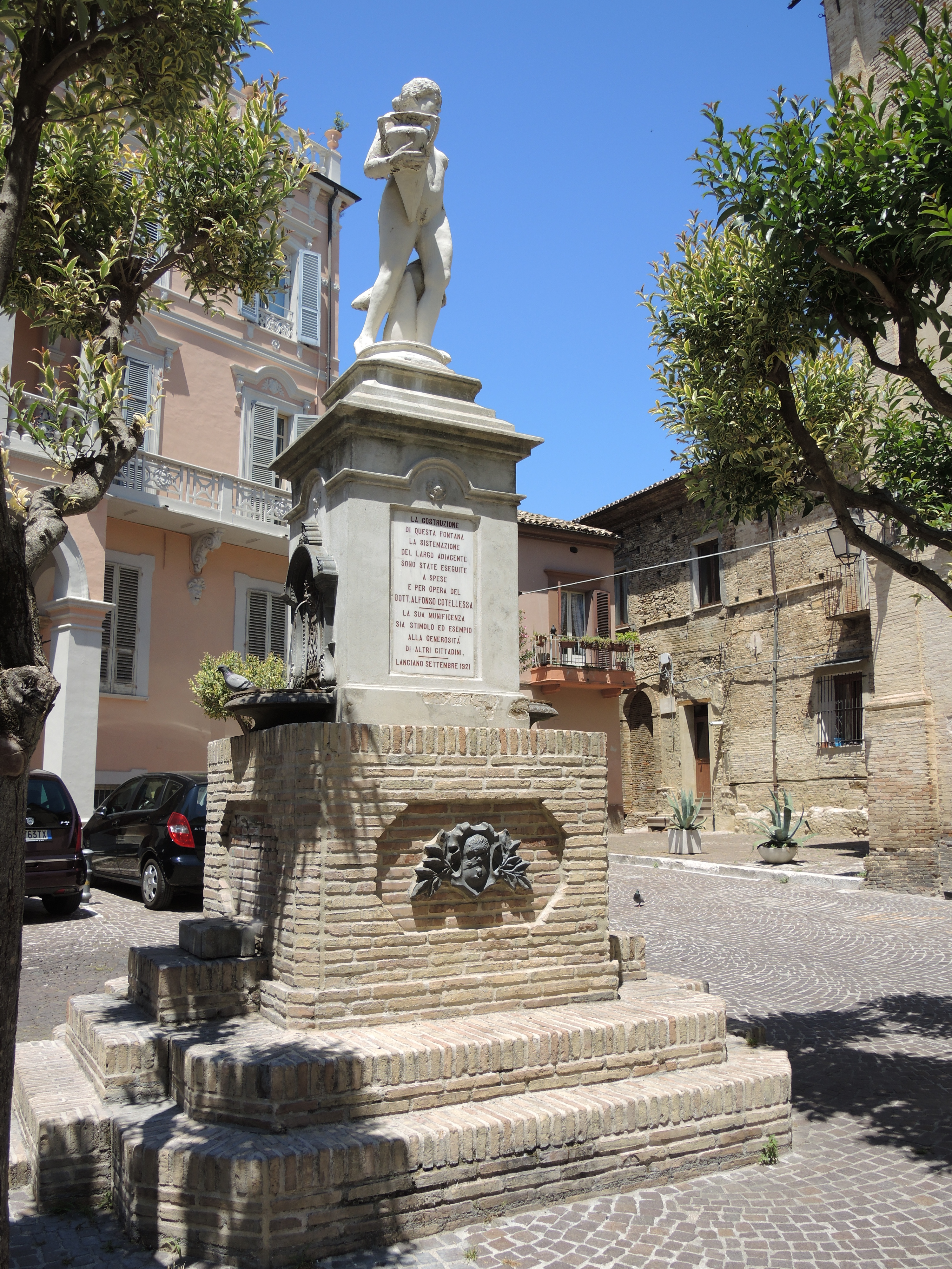 Lanciano - Palazzo del Capitano